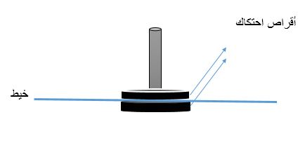 تحديد الشد